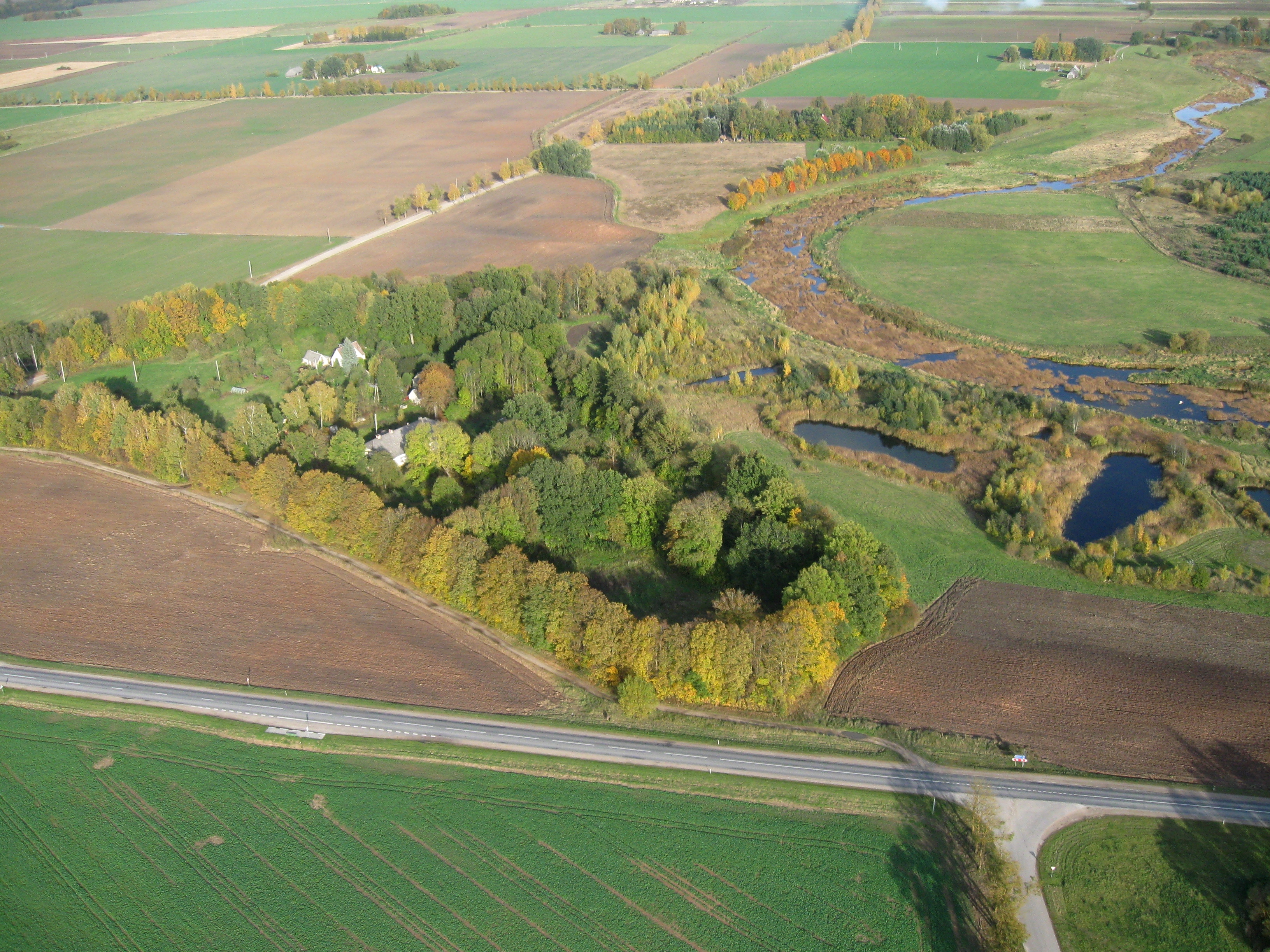 Vytartų dvaras, Pasvalio r. Fotografuota 2009-10-10.